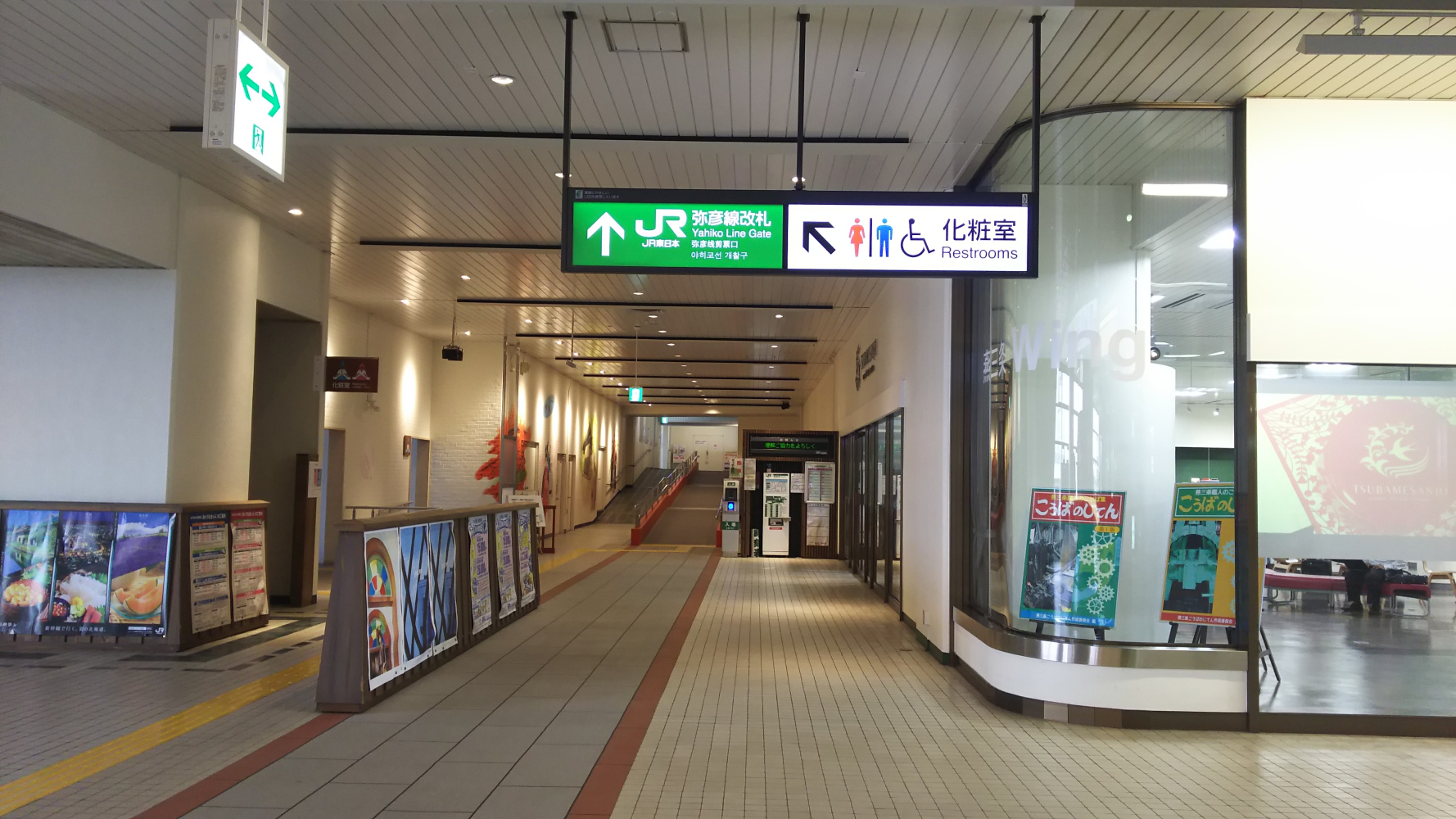 燕三条駅弥彦線改札口